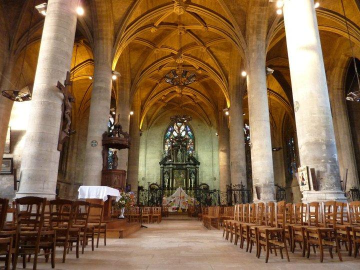 Église Saint-Jean-Baptise de Péronne (Somme, France) - Nef centrale éclairée, 05/07/2010